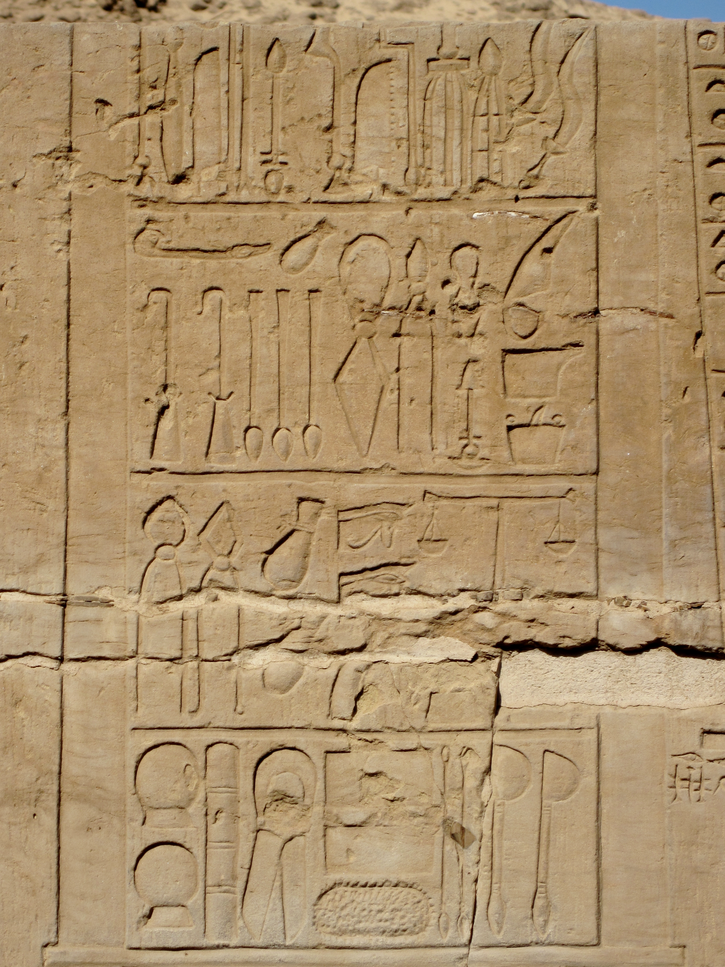 Sogenanntes Ärzterelief mit der Darstellung chirurgischer Instrumente im Tempel von Kom Ombo, Ägypten